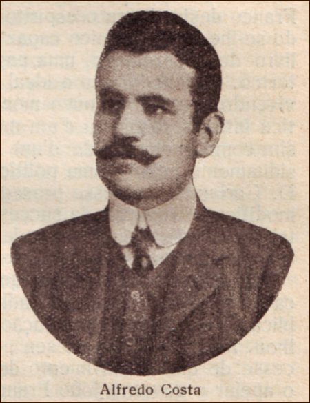 Alfredo Luís da Costa antes de 1908